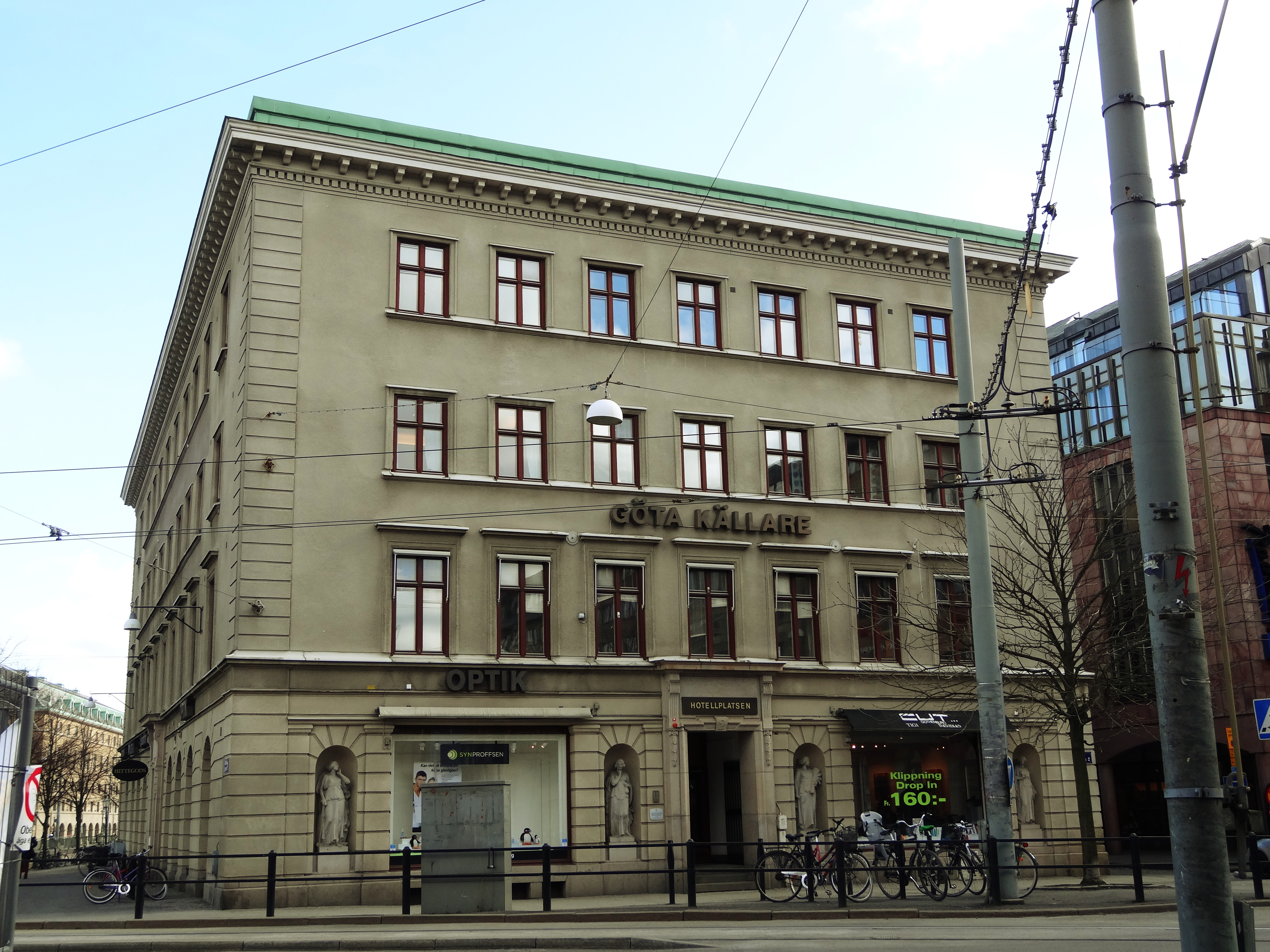 Huset vid Hotellplatsen i Göteborg där hotellet Göta källare hade sin verksamhet 1812-1944.